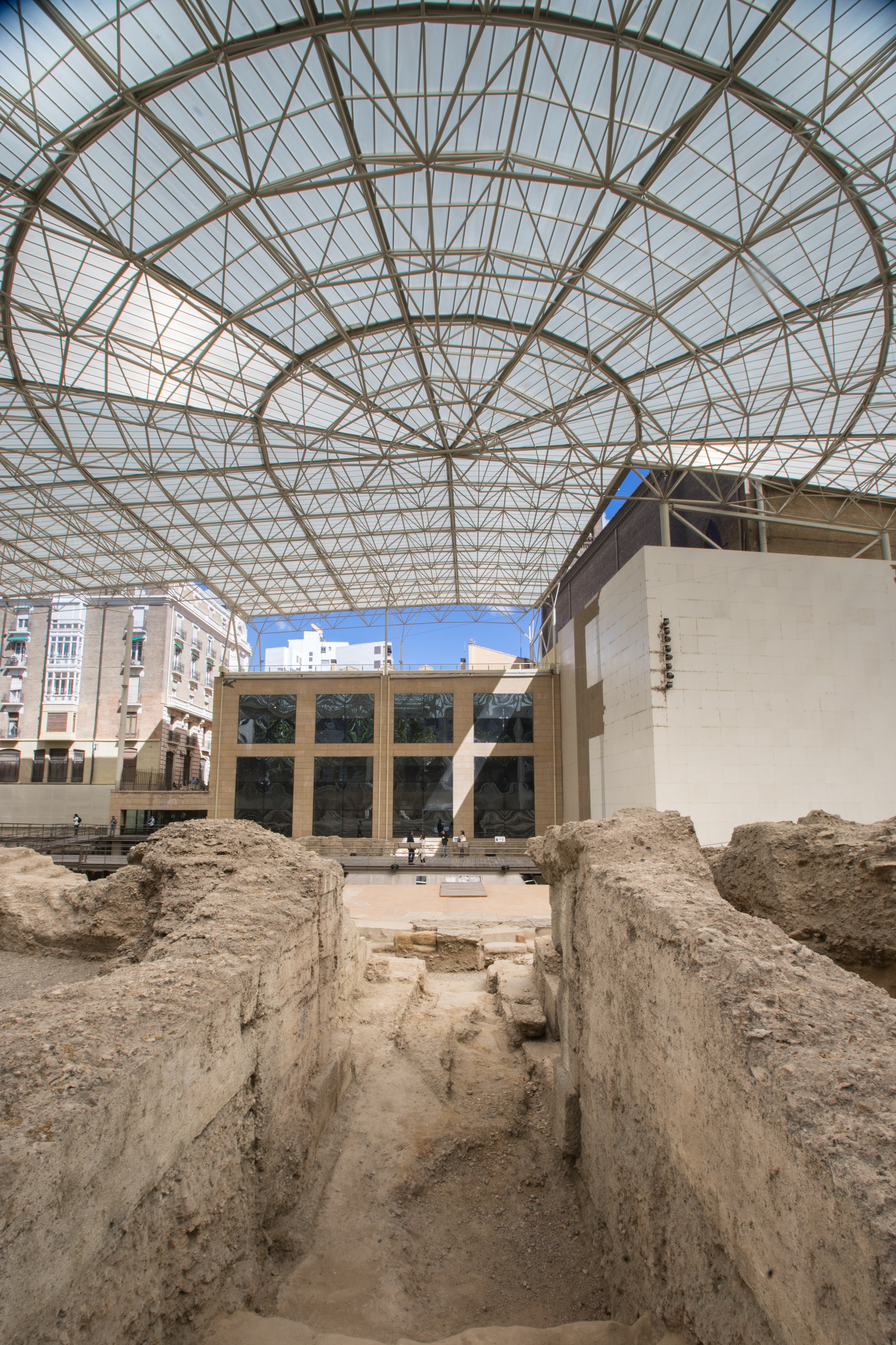 Estructura protectora del Teatro Romano de Zaragoza